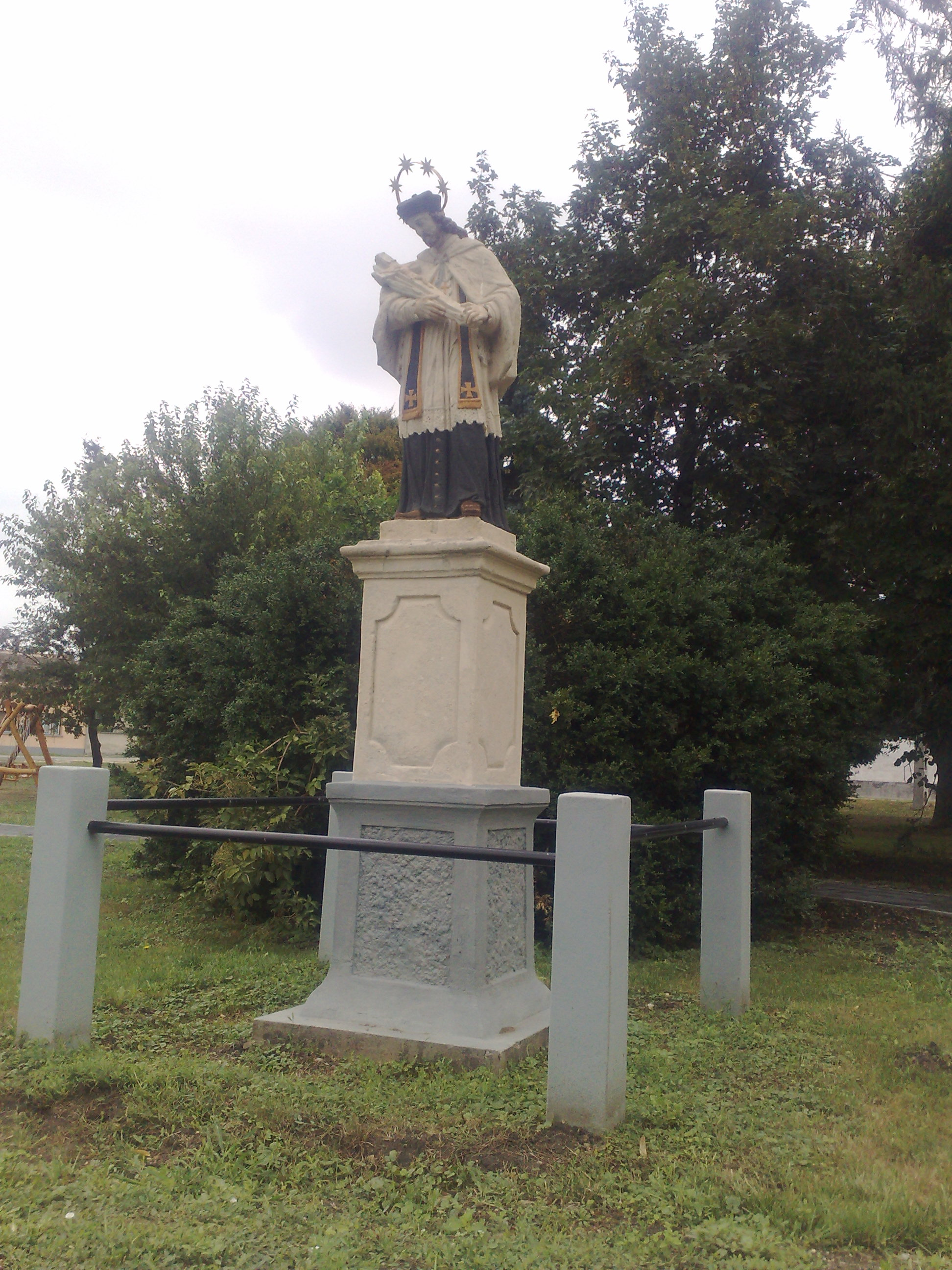 Szany - Nepomuki Szent János szobra a templomkertben